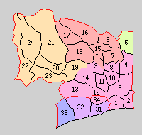 神奈川県中郡の町村。